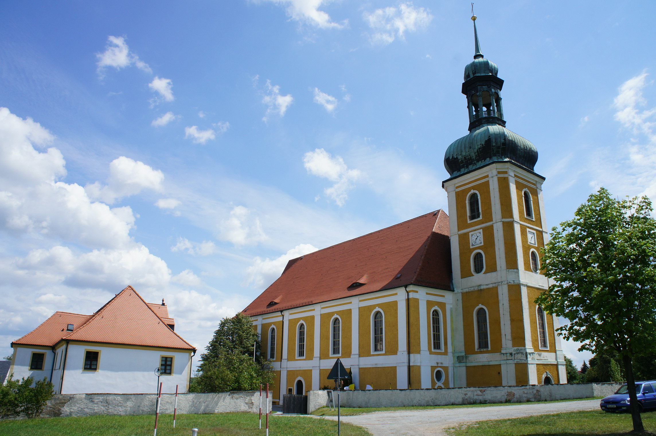 Katholische Wallfahrtskirche Rosenthal. Vorgängerkapelle wurde 1600 erbaut, die dreischiffige Hallenkirche stammt aus dem Jahr 1778. Abgebrannt am 1. Mai 1945 bis auf die Mauern und das Deckengewölbe, dabei konnte das Gnadenbild gerettet werden. 1947 wieder eingeweiht, Außenerneuerung 1979/80, Innenerneuerung 1987.